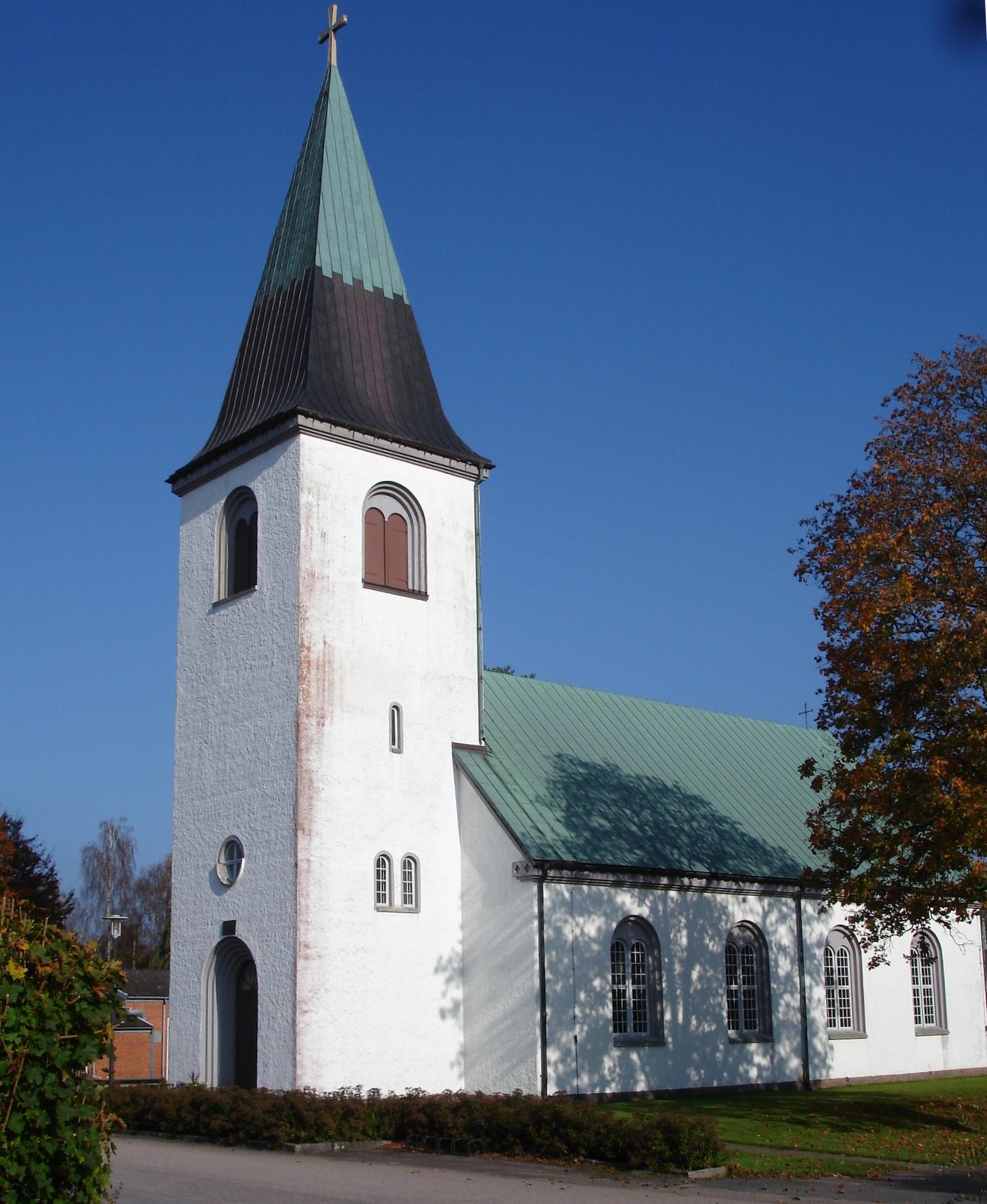 Hyltebruks kyrka, Hallands län, Göteborgs stift